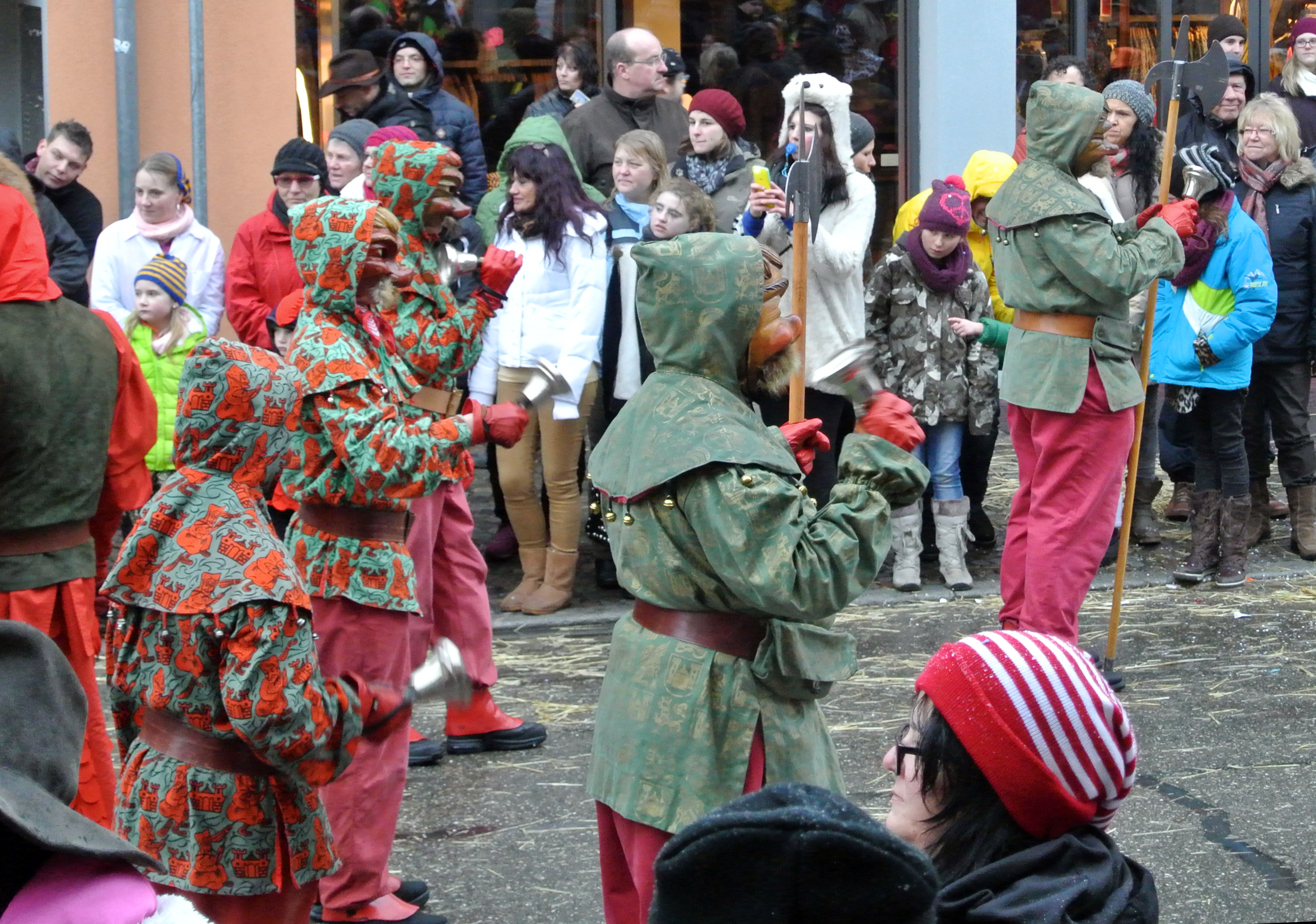 Büttel (Sechser) der Offenburger Hexenzunft e.V. beim Jubiläumsumzug 150 Jahre Narrenzunft Krakeelia Waldkirch e.V. am 01.02.2015